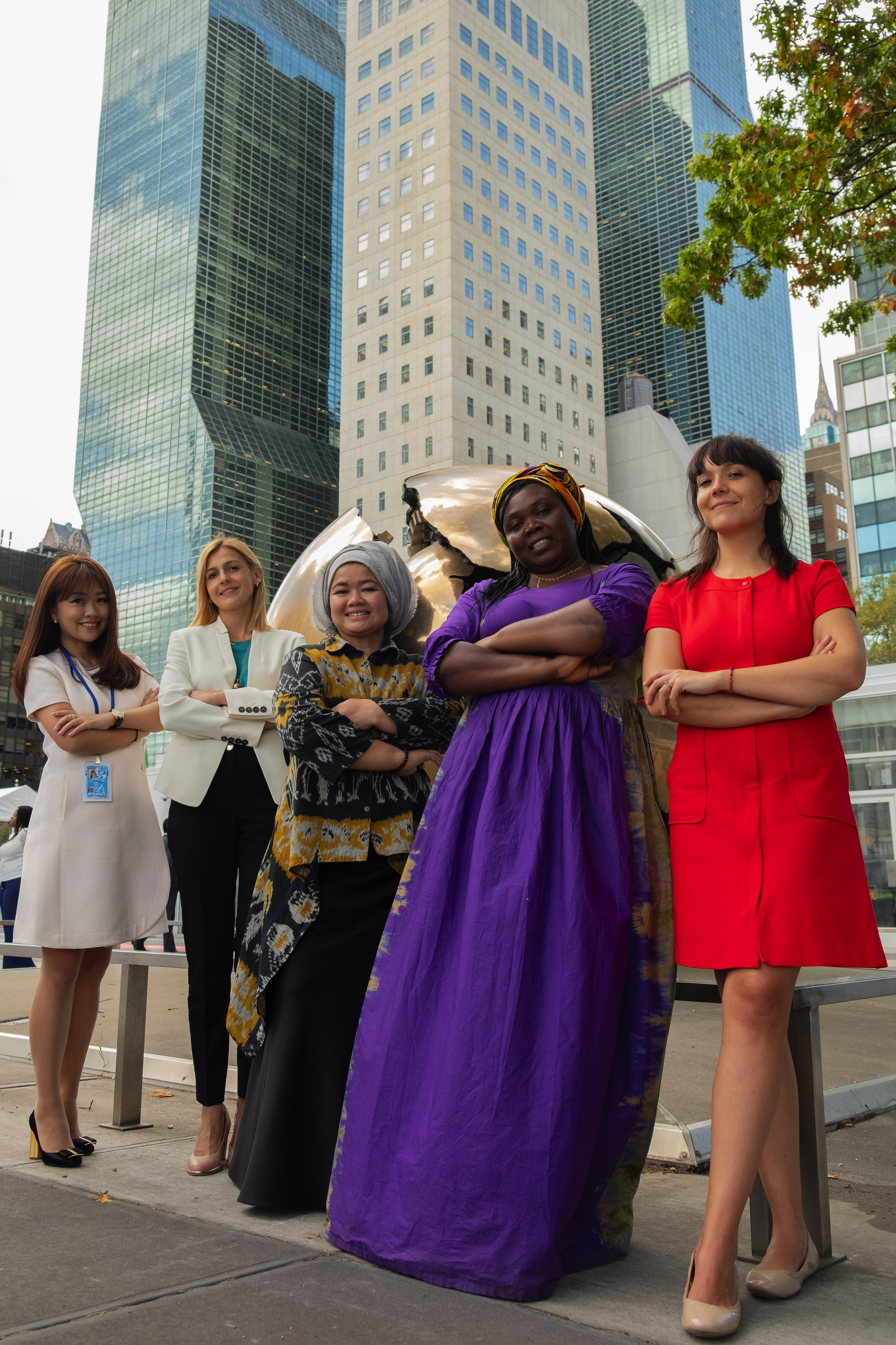 L to R: Xiaofei Yao Nina Angelovska Helianti Hilman Patricia Zoundi Yao and Claudia de Heredia loaded by Victuallers